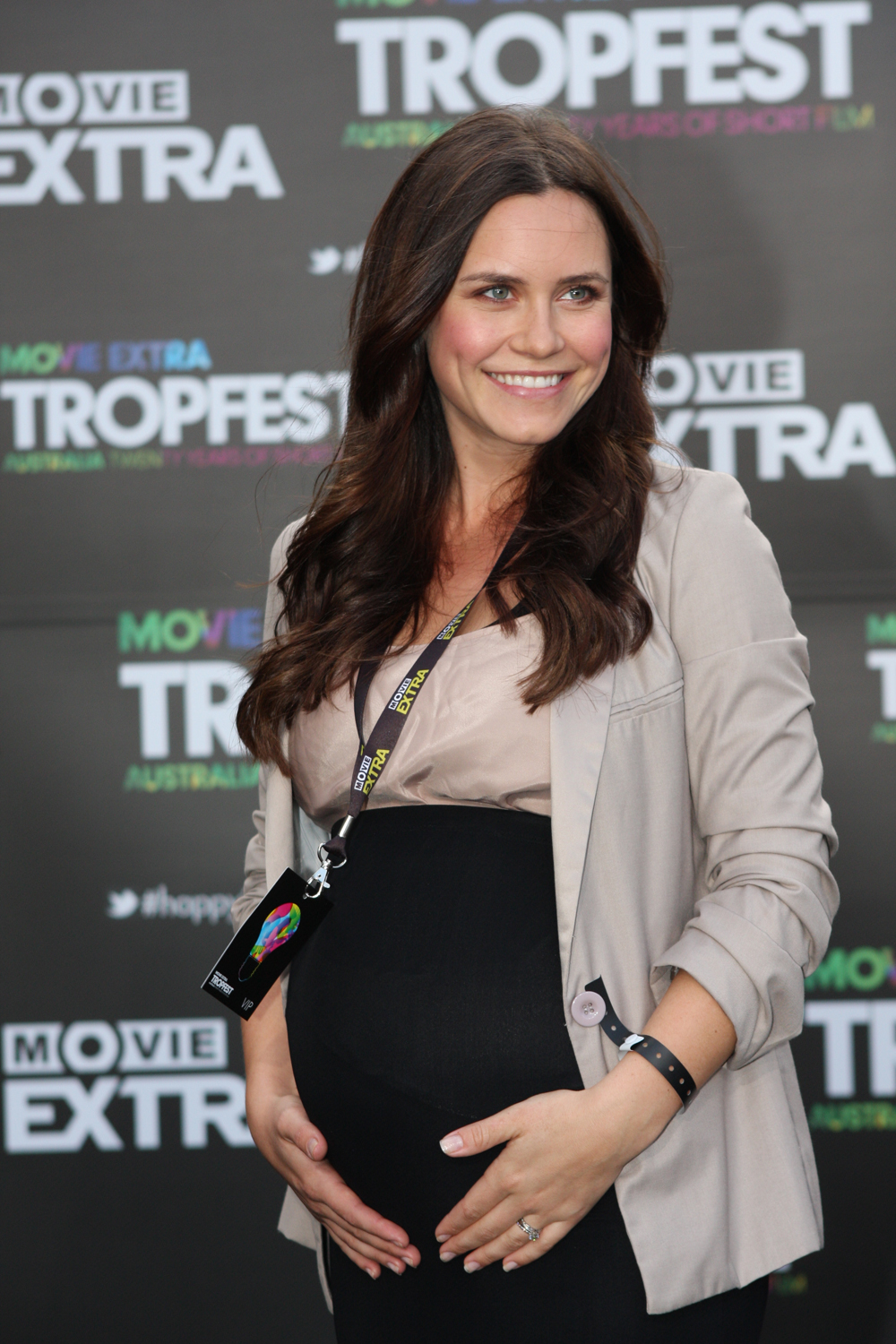 Saskia Burmeister, Tropfest Opens In Sydney, Australia.